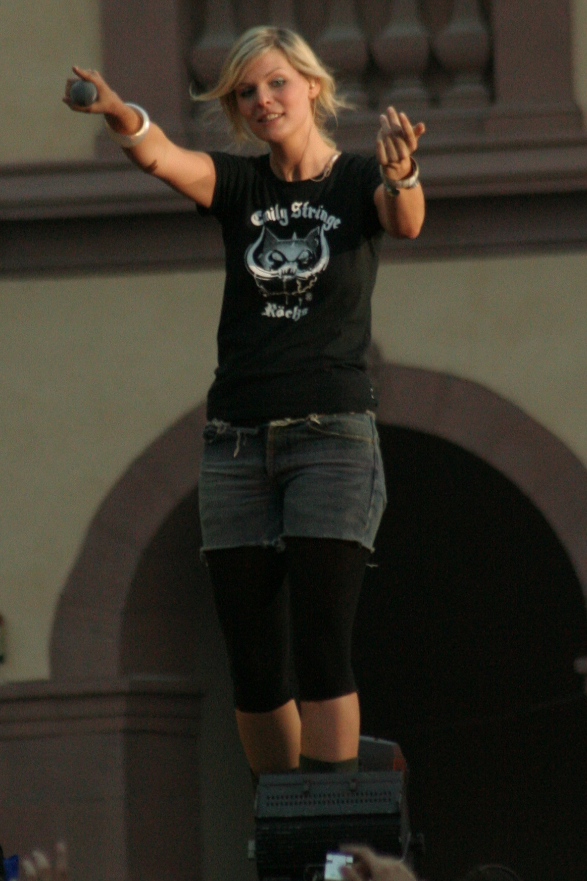 Eva Briegel (Frontsängerin von Juli) bei der Arena of Pop 2007 im Mannheimer Schloss - Nr. 001 Eva Briegel (Frontsinger of Juli) at the "Arena Of Pop" 2007 on Mannheim Castle - No. 001